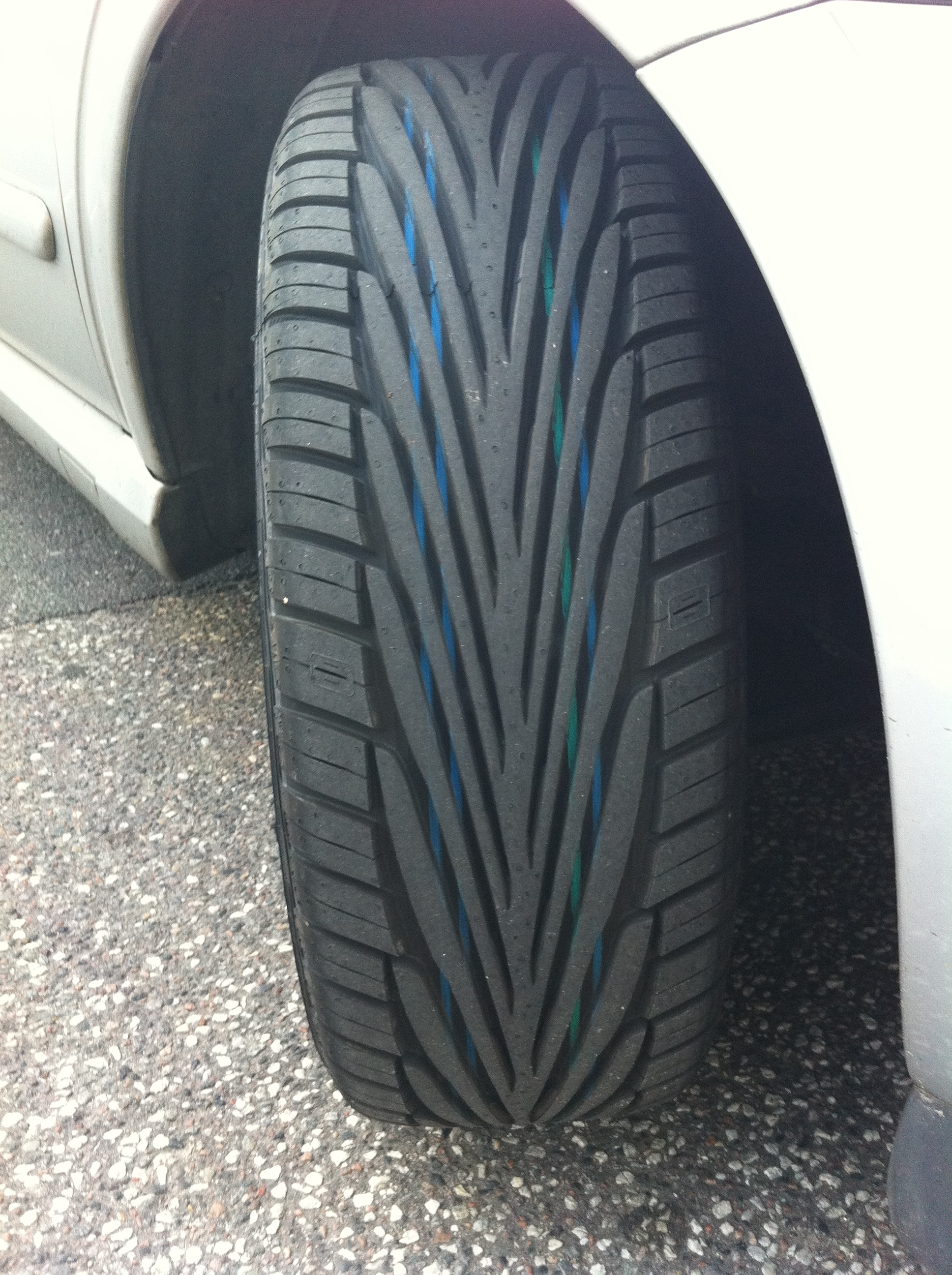 Autoreifen mit für Nässe optimiertem Profil